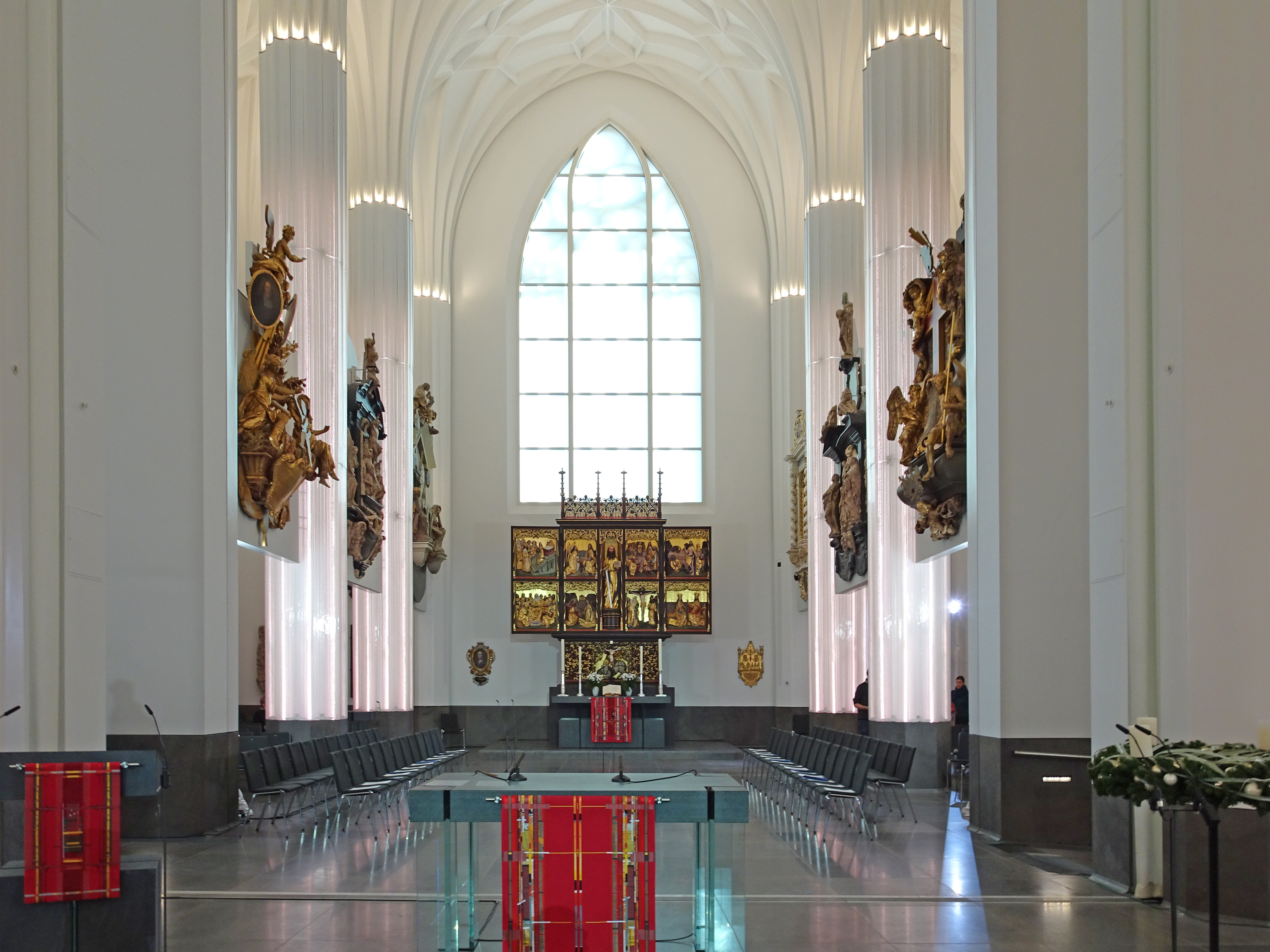 Blick zum Altarraum anlässlich der Weihe der Leipziger Universitätskirche